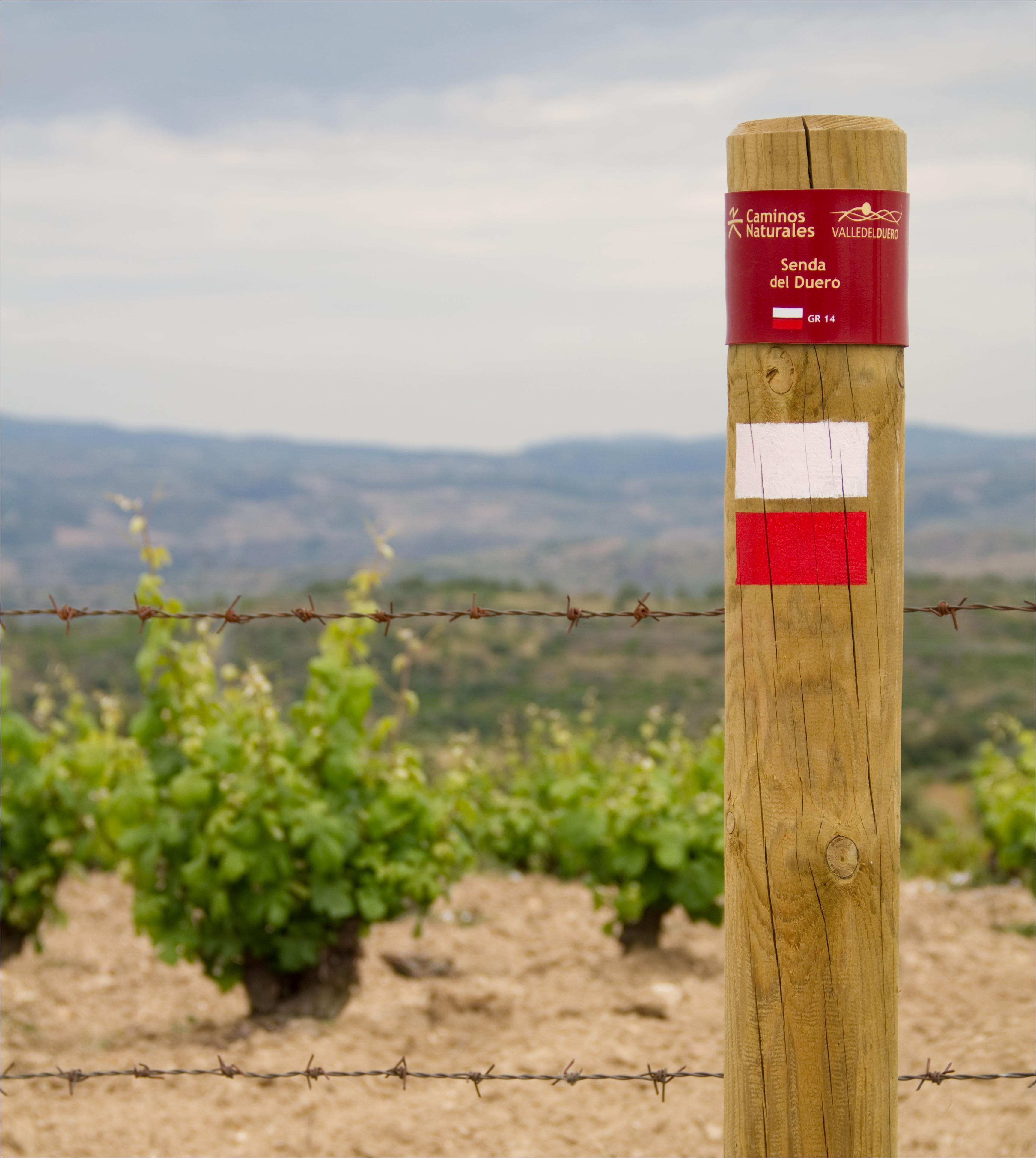 Poste indicativo del GR-14 a su paso por Pereña de la Ribera, en el Parque Natural de Arribes del Duero, España.